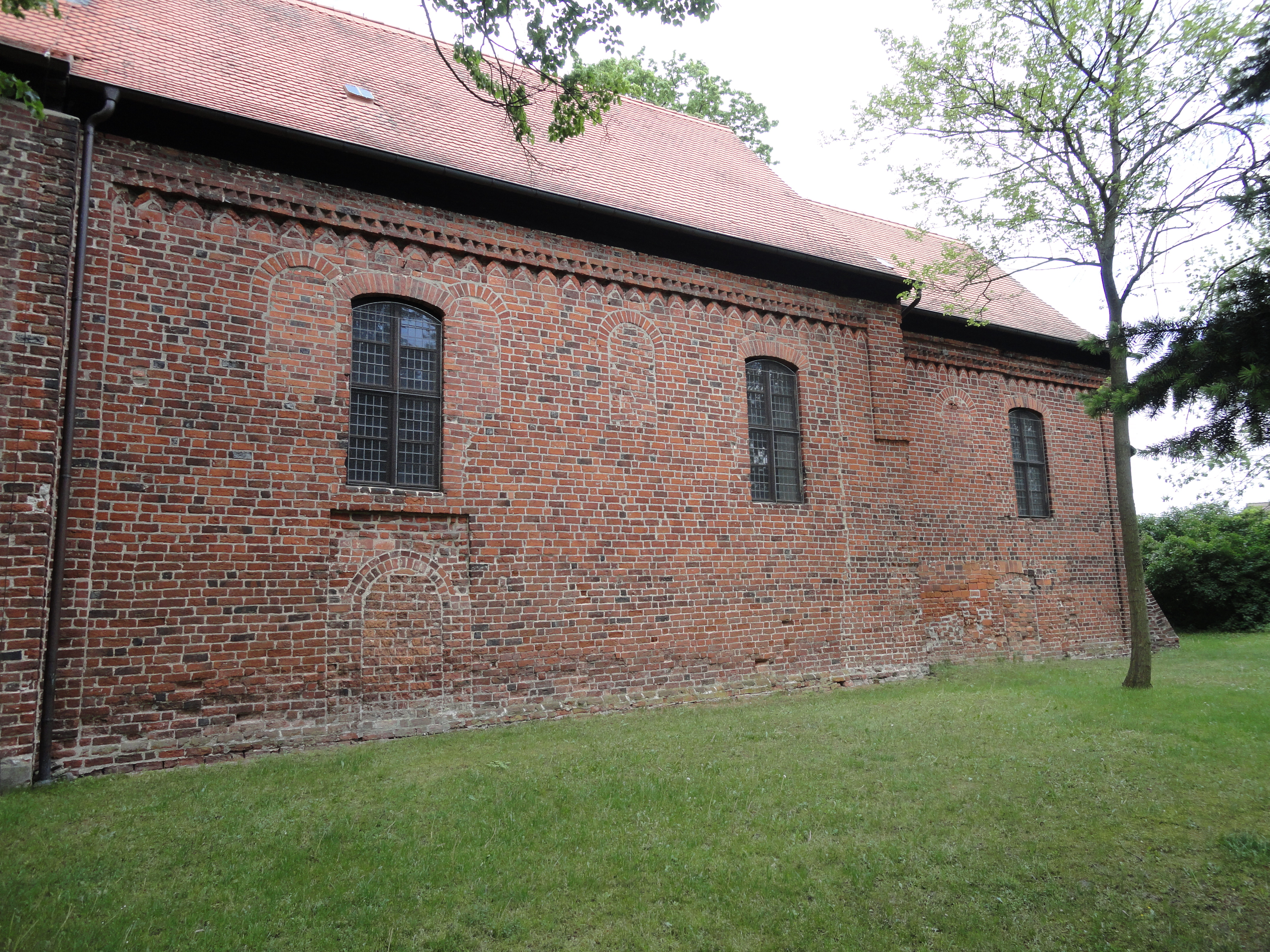 Dorfkirche in Roßdorf, Südansicht mit Schmuckfries und vermauerten Rundbogenfenstern